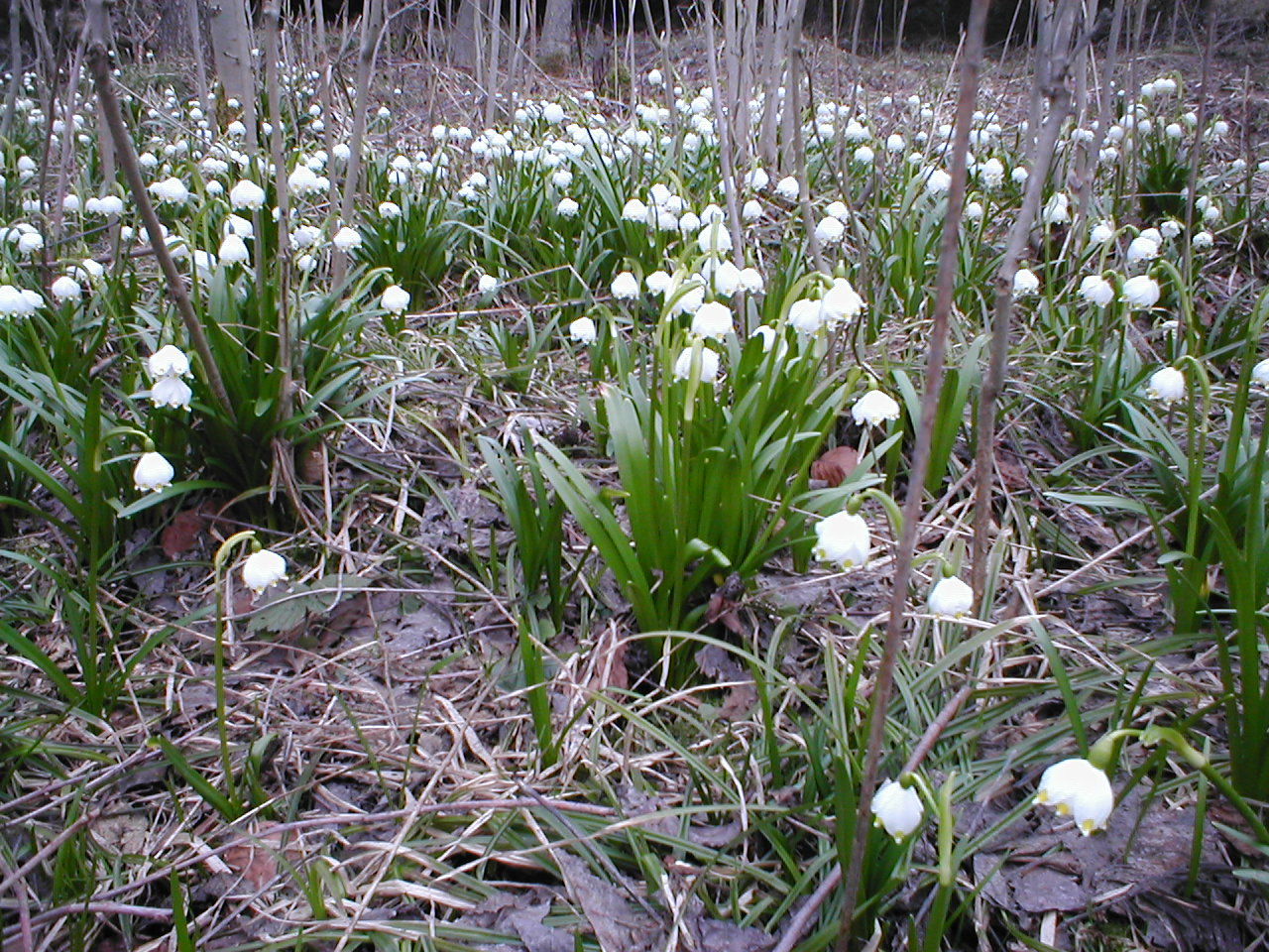 Bledule v NPR Ransko.